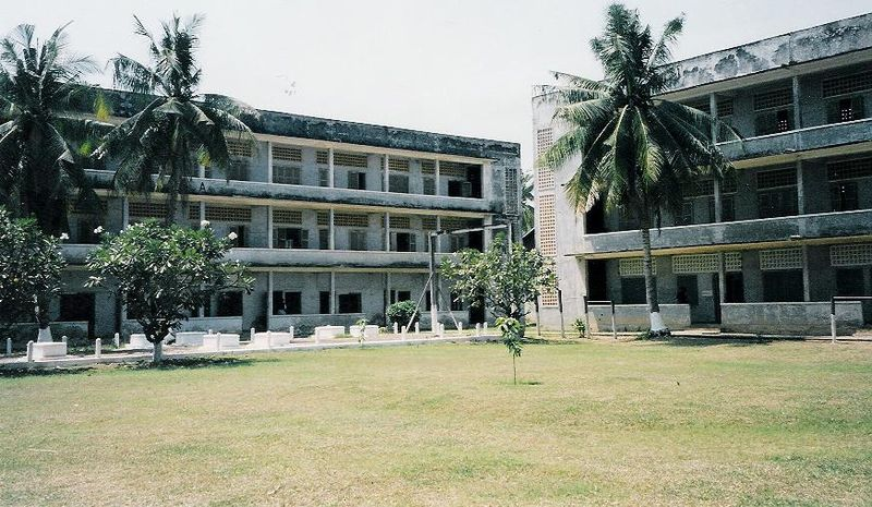 בית ספרבקמבודיה. זכויות היוצרים שייכות לי